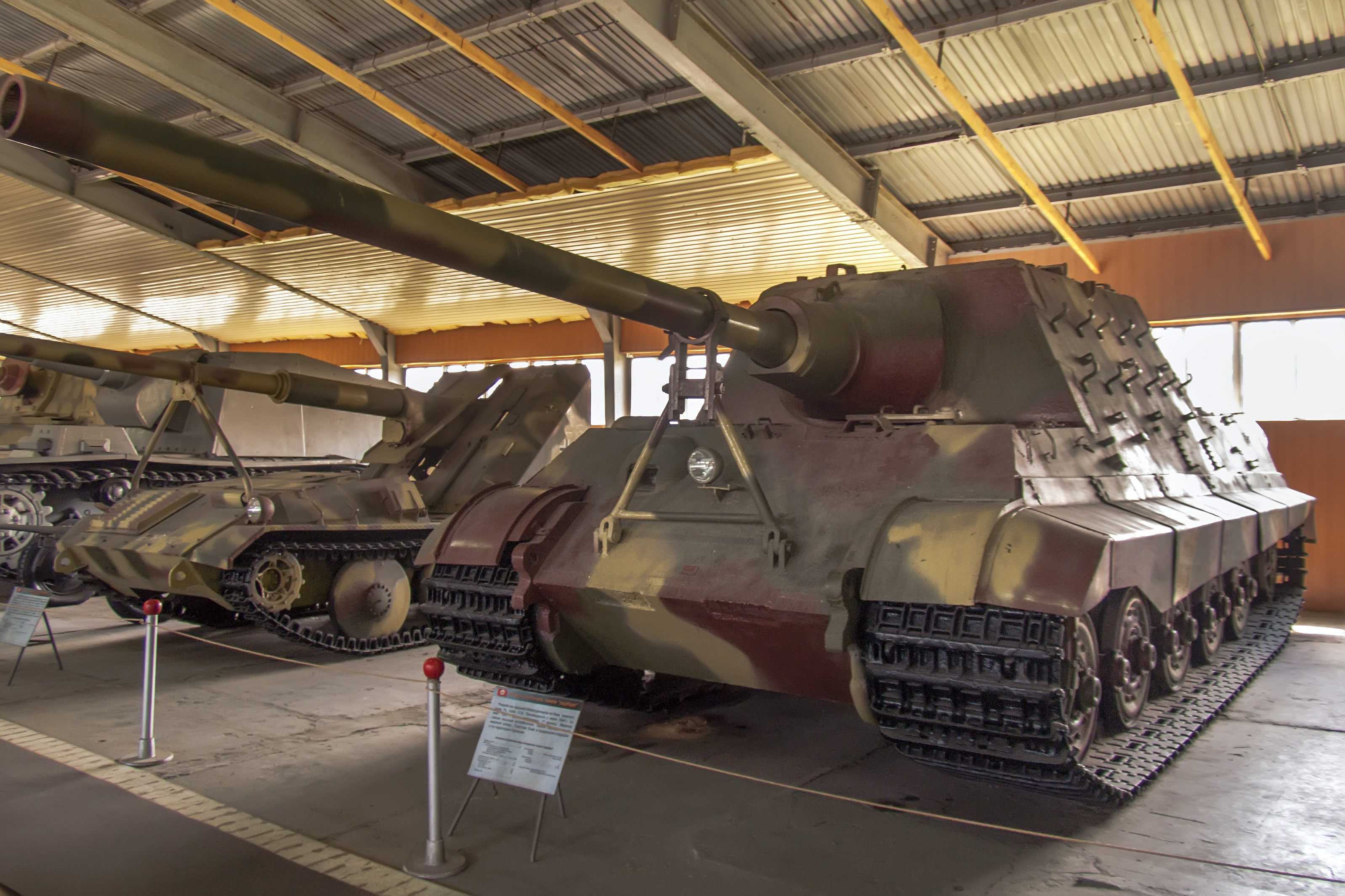 Противотанковая самоходная установка "Ягдтигр" (Panzerjäger Tiger, Sd.Kfz 186) в Центральном музее бронетанкового вооружения и техники в Кубинке.